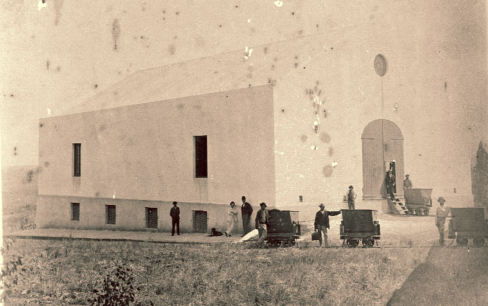 Bodega en 1895